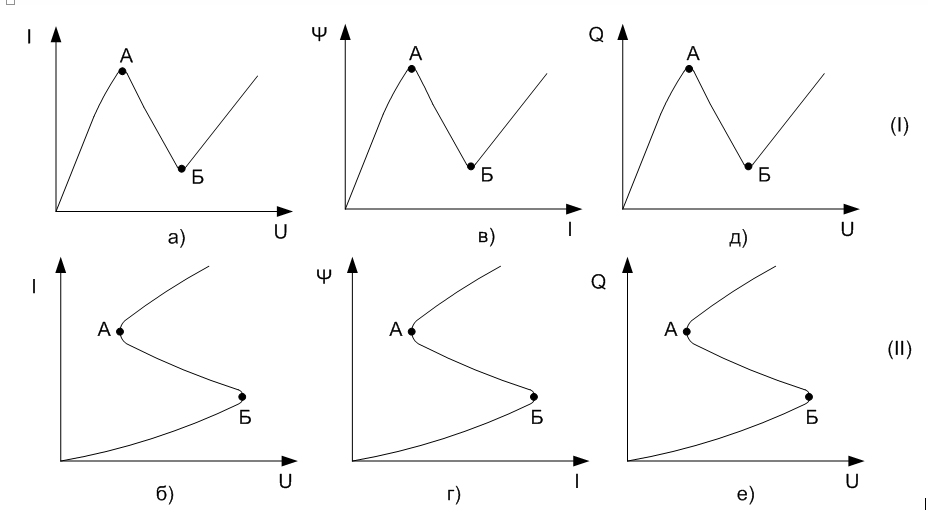 Рис. 2 – Вольт амперные (а, б), вебер-амперные (в, г) и вольт-кулонные (д, е) характеристики статических негатронов